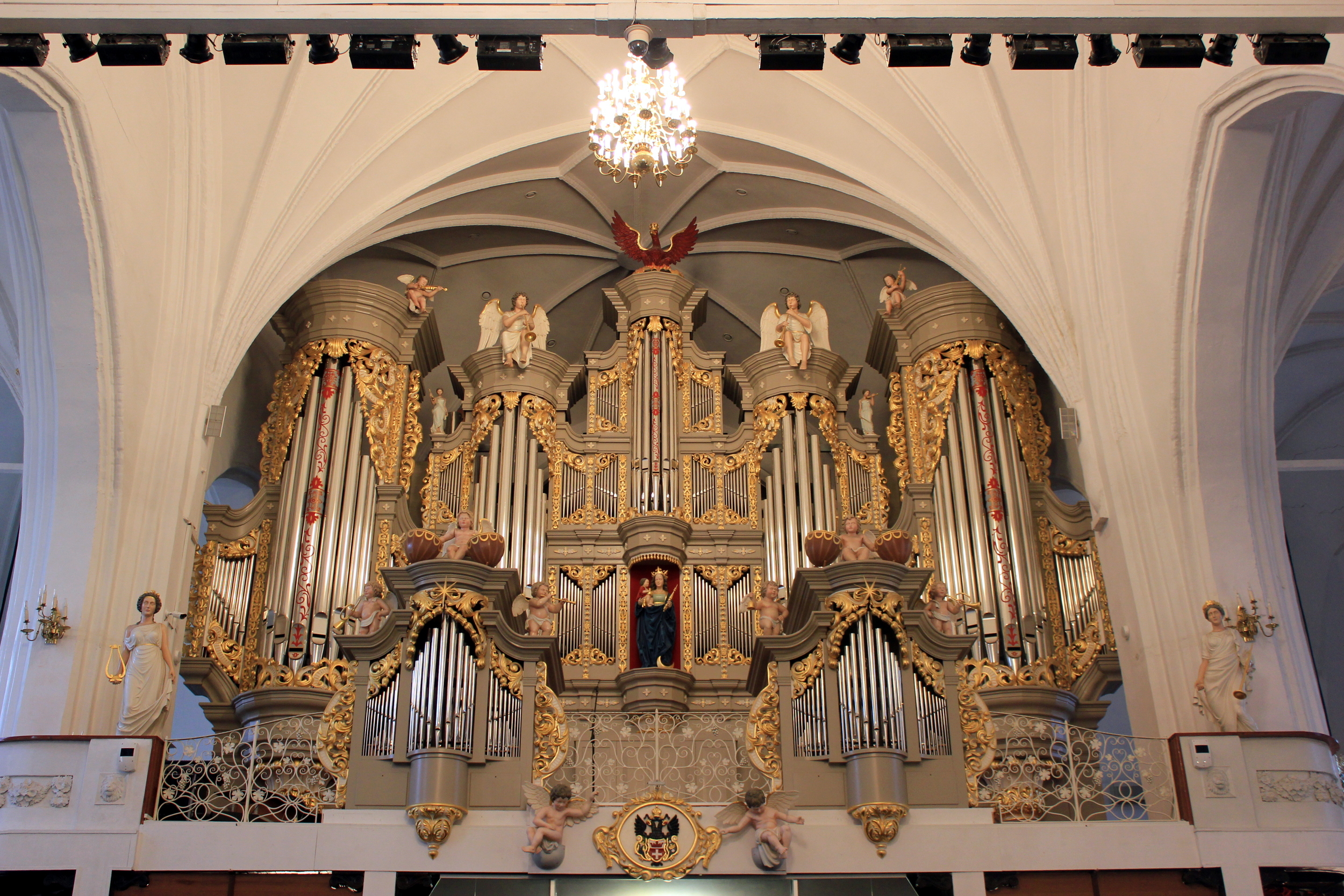 Die Orgel im Königsberger Dom; Kaliningrad, Russland.